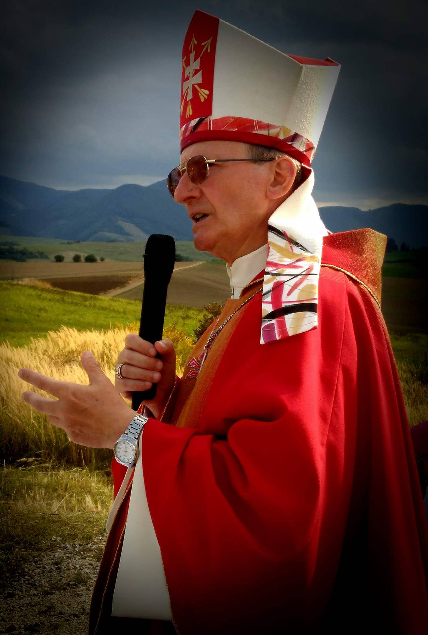 Mons. František Rábek, vojenský ordinár OS a OZ SR